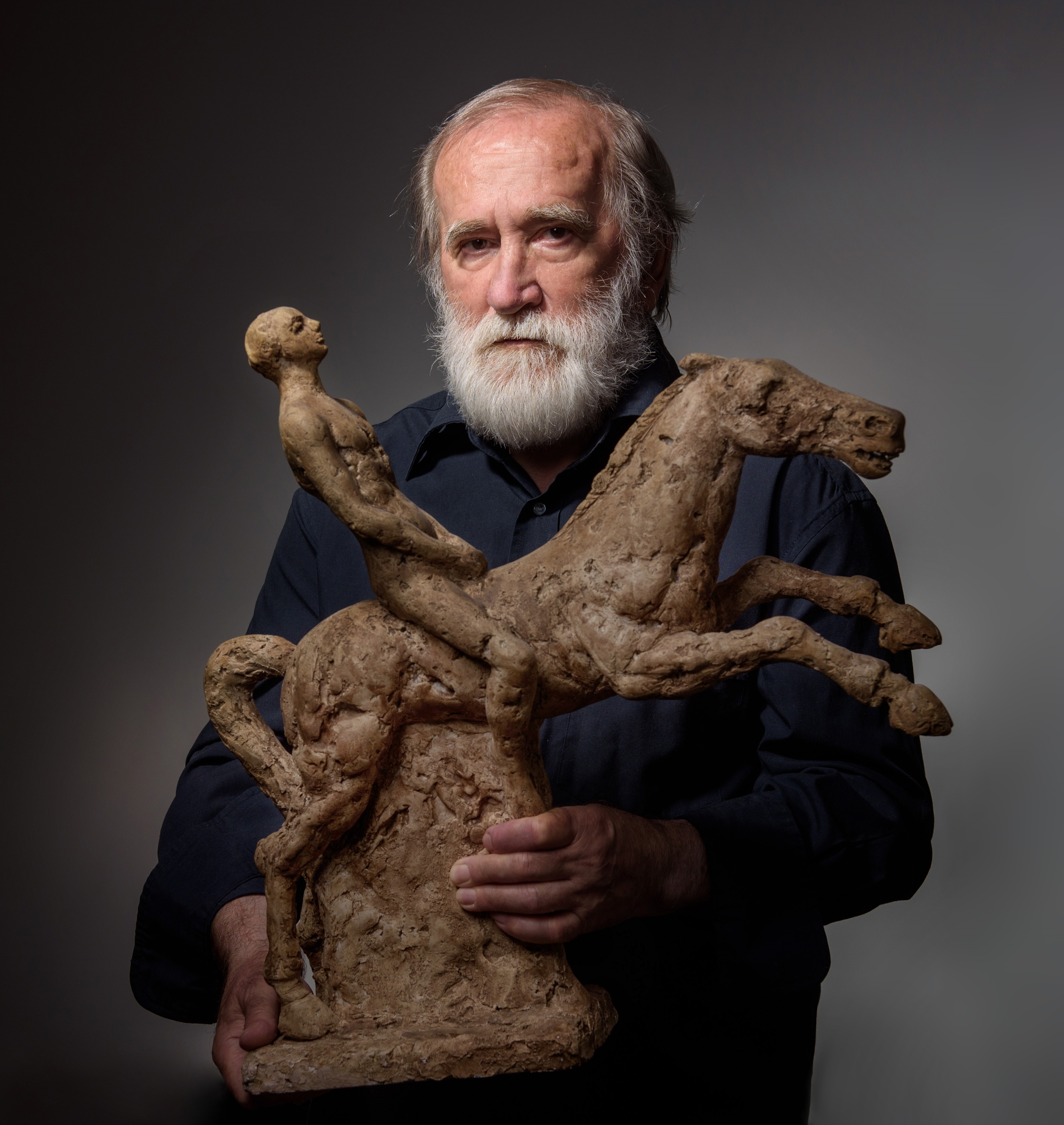 Josip Konta, foto portret, godina 2015